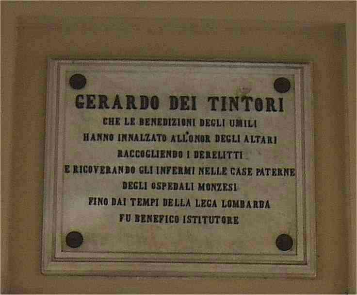 MB Monza Ospedale vecchio targa dedicatoria a San Gerardo dei Tintori